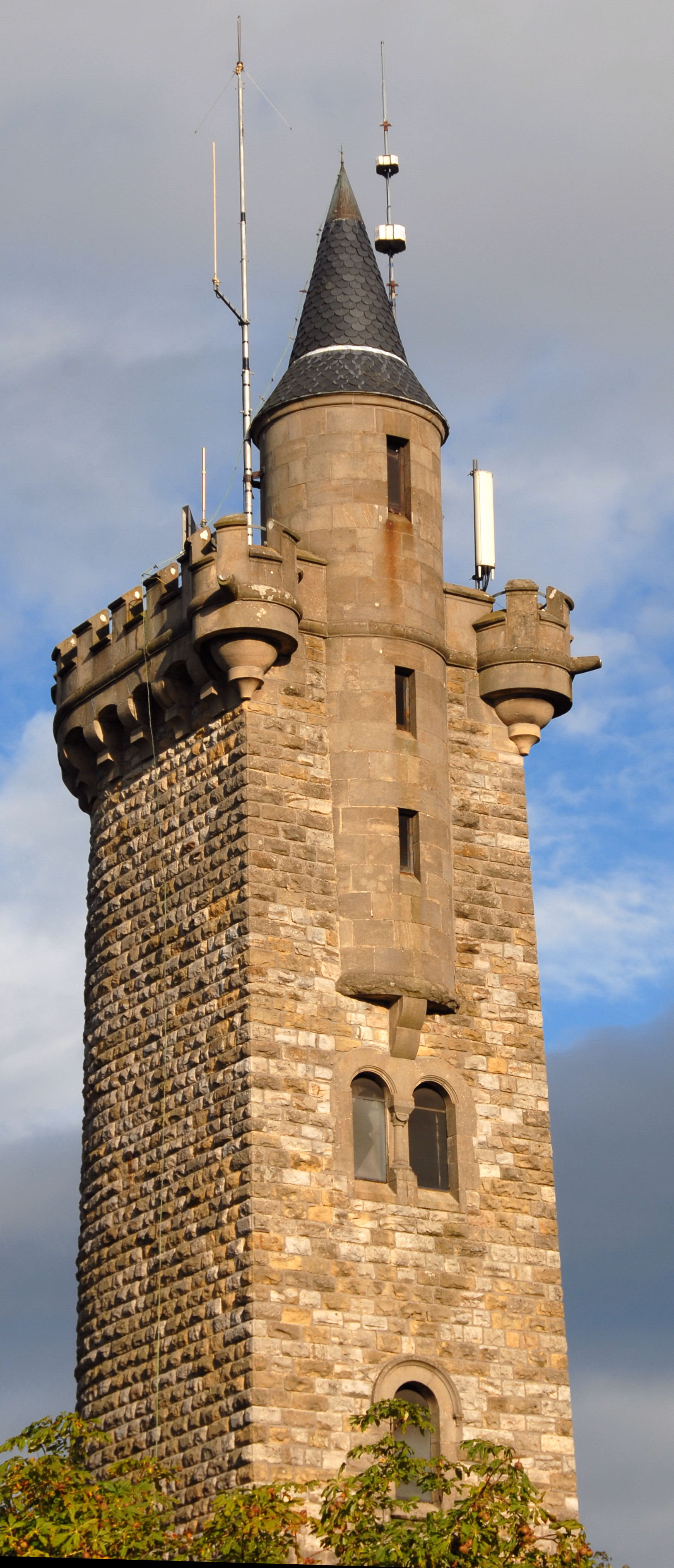 De Waassertuerm um Lampertsbierg vum Architekt Antoine Luja.